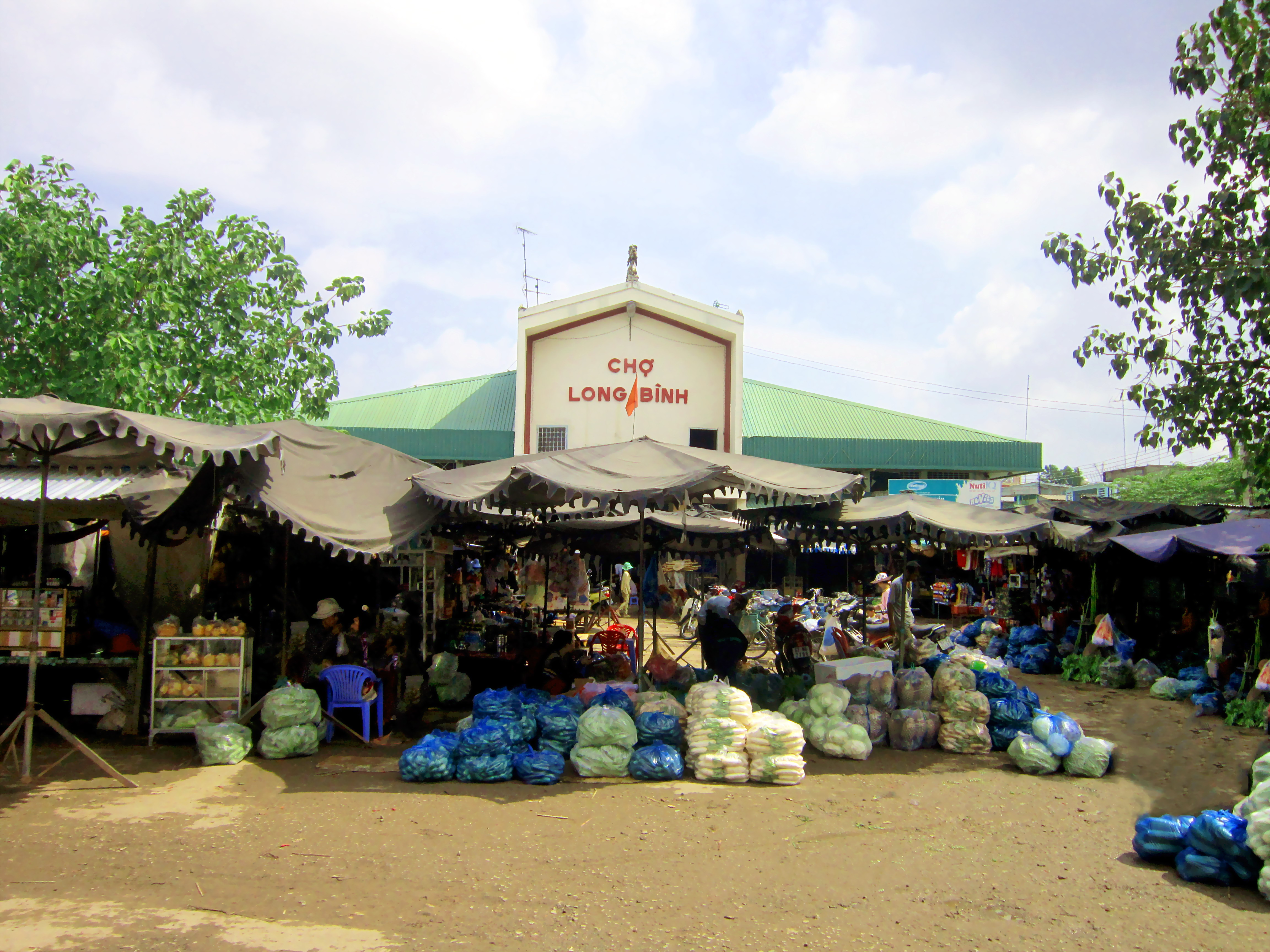 Chợ thị trấn Long Bình thuộc huyện An Phú, tỉnh An Giang, đồng bằng sông Cửu Long, Việt Nam.